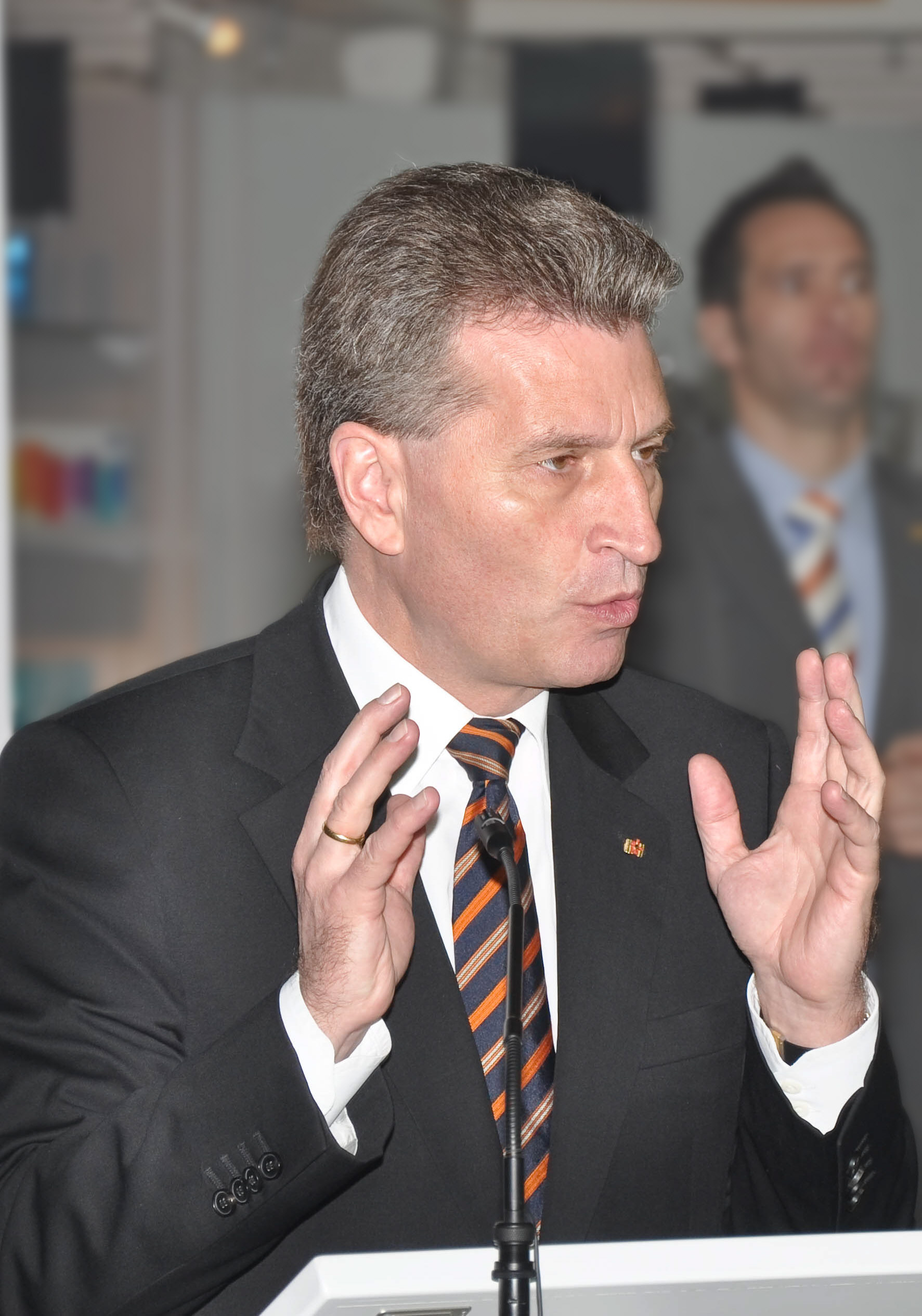 Günther Oettinger beim Neujahrsempfang der CDU in Bopfingen